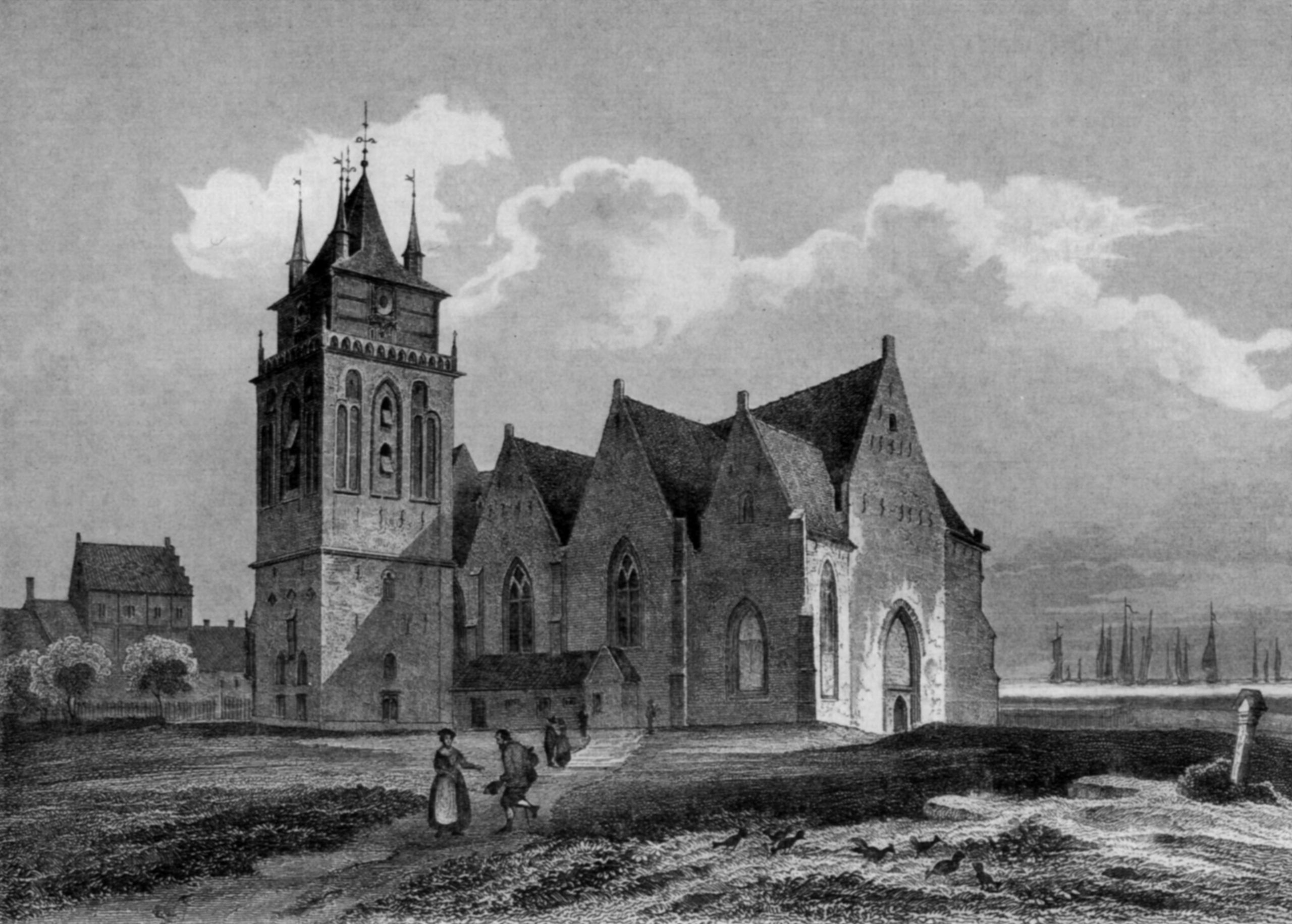 Höfer, E.: Emden (Ostfriesland), Grosse Kirche von Nordwesten, Stahlstich nach einer Zeichnung von Ludwig Rohbock